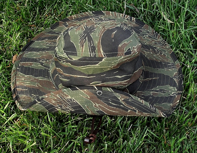 Tigerstripe Hat - Post-Vietnam Era